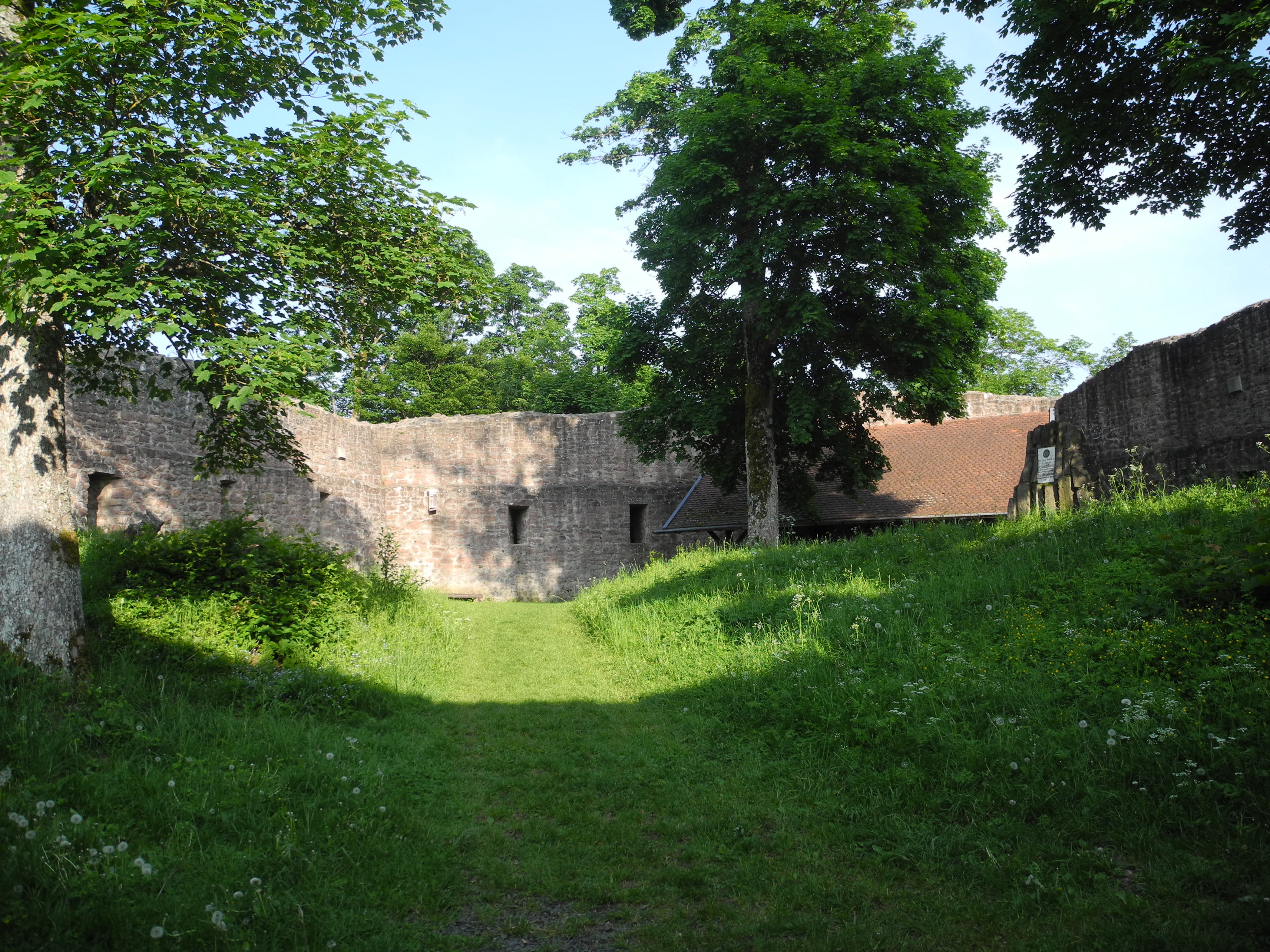 Die Ruine Auersburg ist die Ruine einer Höhenburg in der Rhön, in der Gemeinde Hilders im Landkreis Fulda in Hessen, Deutschland.